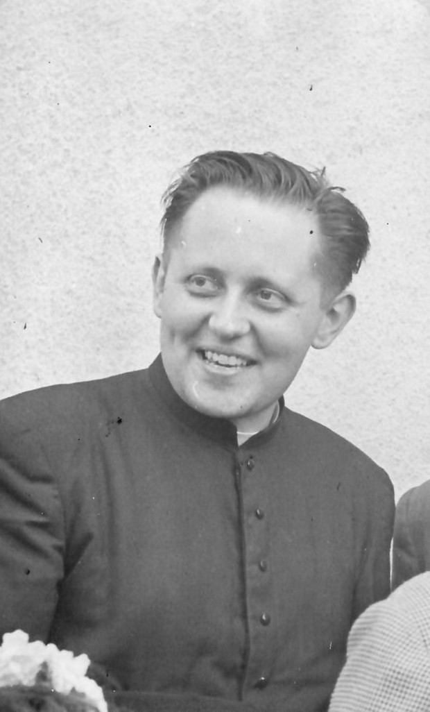 P. Stanislav Krátký při oslavě deseti let kněžství v roce 1956.